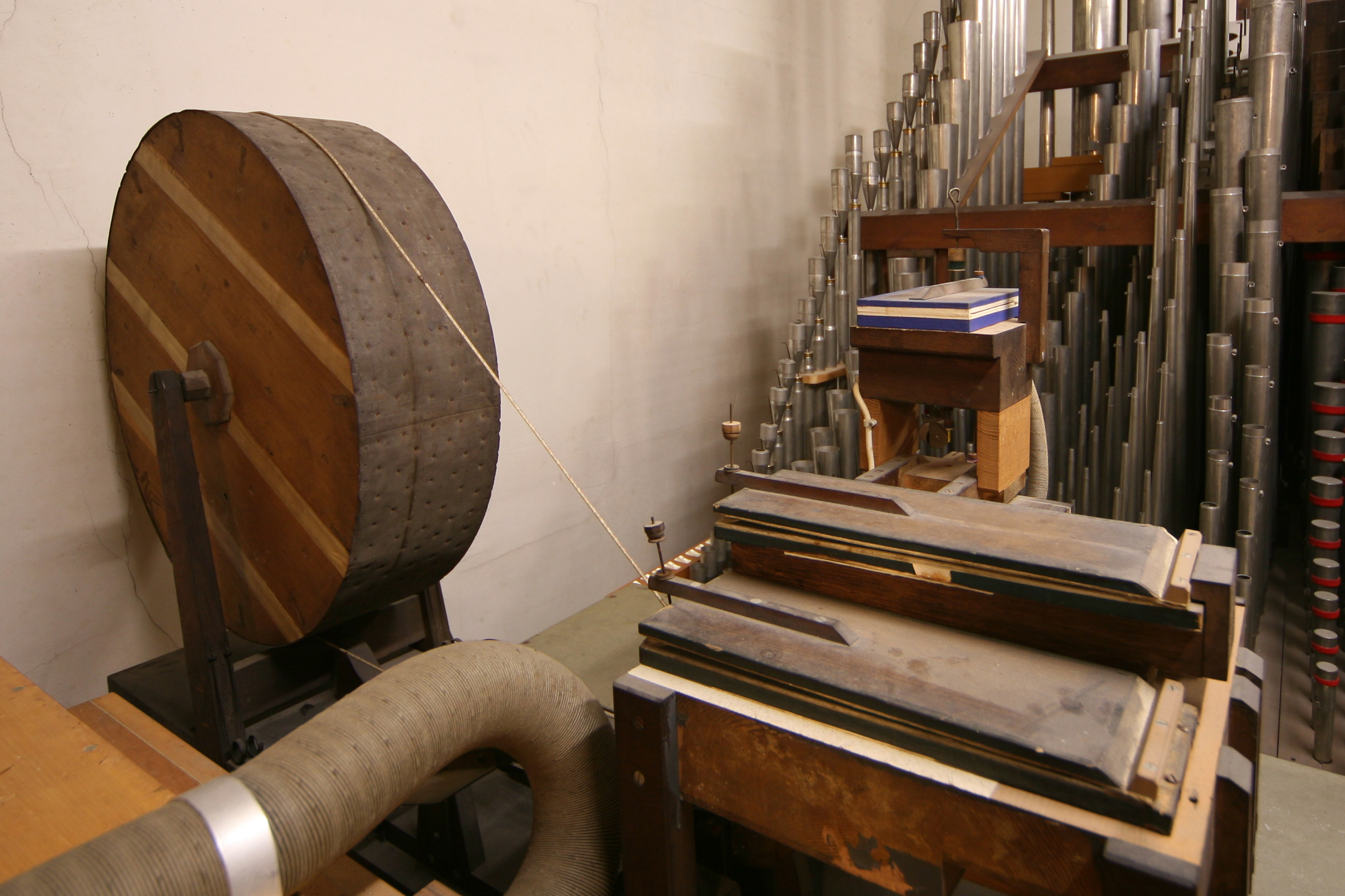 Regenmaschine Orgel Hofkirche Luzern